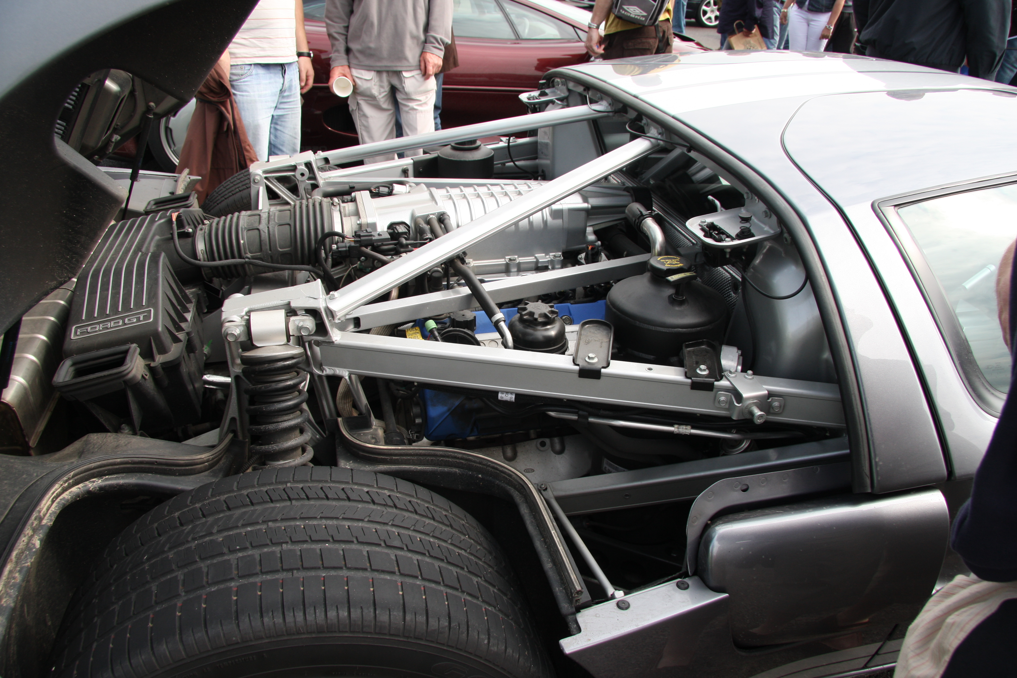 Ford GT